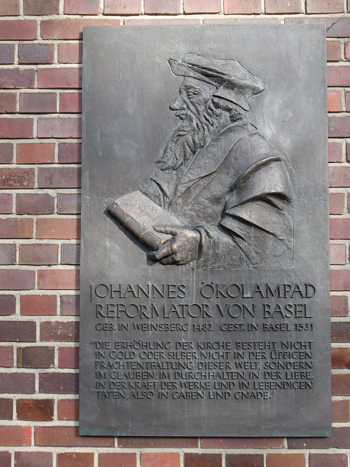 Gedenktafel für Johannes Oekolampad (1482–1531) Gemeindehaus Oekolampad, Allschwilerplatz, Basel. 1528 heirateten Johannes Oekolampad und Wibrandis Rosenblatt. Der Ehe entstammten drei Kinder. Nach einer fünfmonatigen Witwenzeit kam es zur Heirat mit dem 26 Jahre älteren Witwer Wolfgang Capito (1478−1541). Nach dessen Tod heirateten Wibrandis Rosenblatt und Martin Bucer im Jahr 1542.